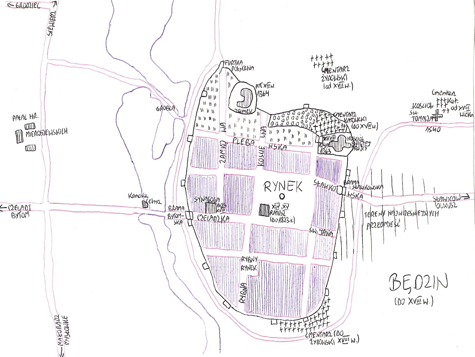 Mapa Będzina do końca XVIII wieku - na podstawie pracy Włodzimierza Błaszczyka, "Będzin przez wieki. Dzieje miasta i jego rozwoju urbanistyczno-przestrzennego od średniowiecza do połowy XX – wieku na podłożu osadnictwa w starożytności i wczesnym średniowieczu", Poznań 1982.